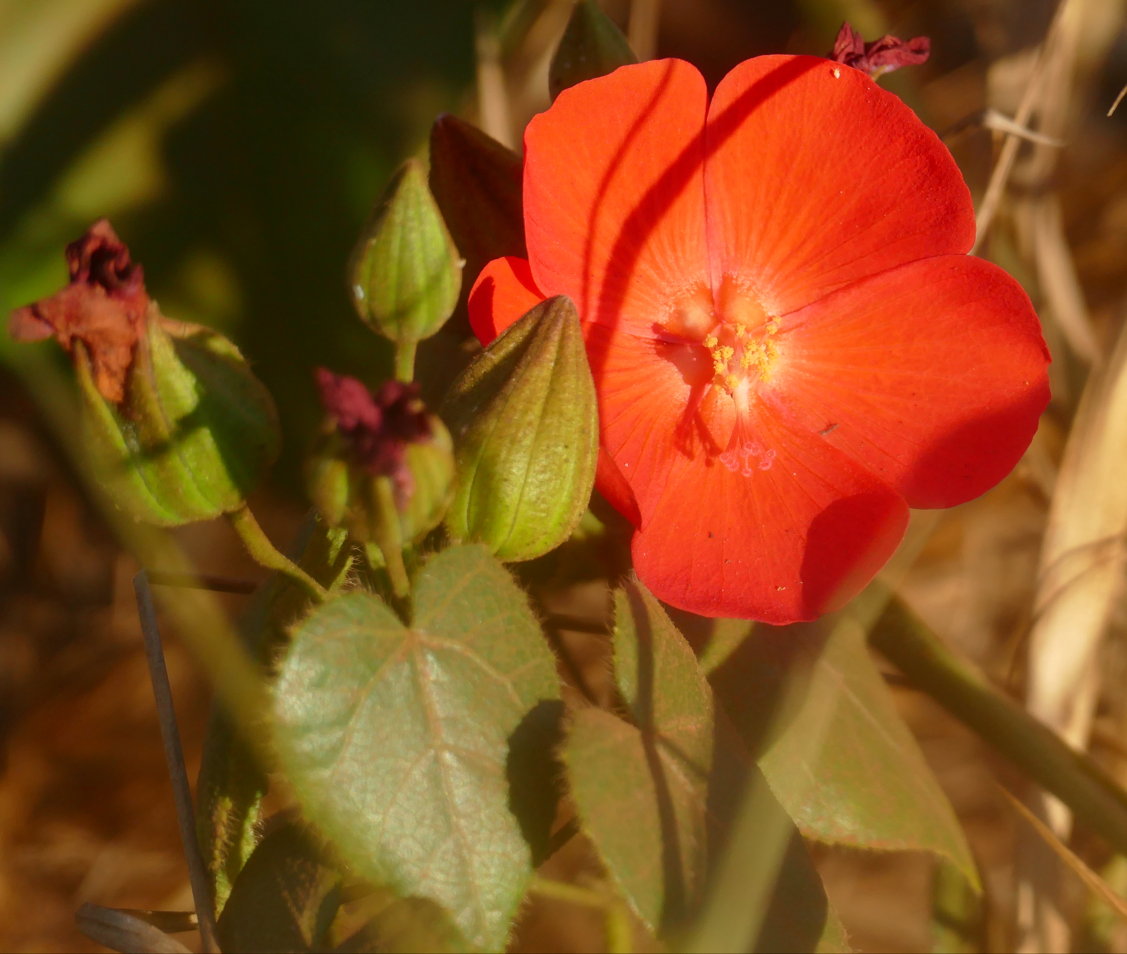 Cachoeira Veu da Noiva, Parque Nacional da Chapada dos Guimarães, Mato Grosso, BRAZIL